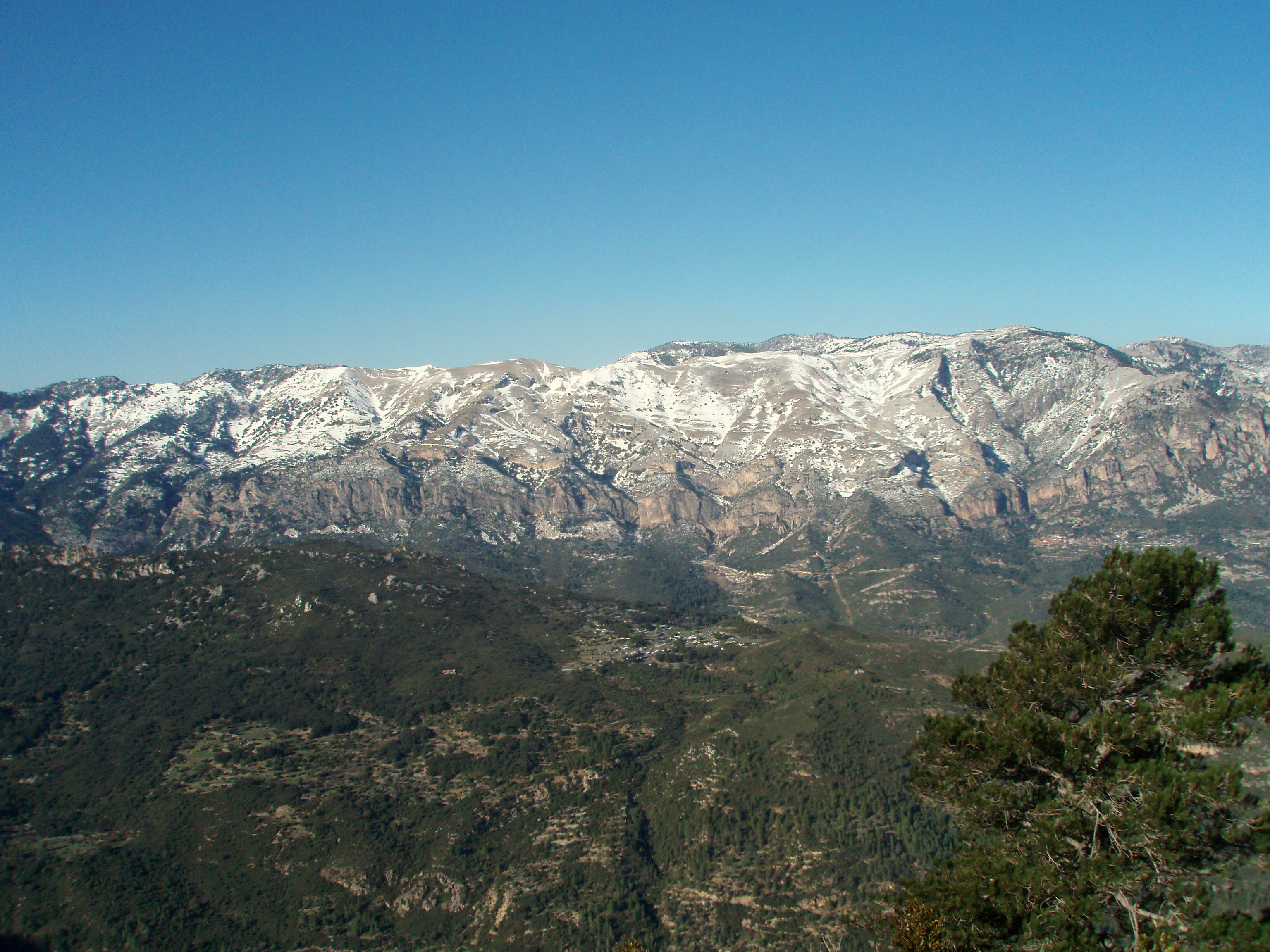 Les Rases de Maraco des de la Punta de Farrúbio. This is a photography of a Special Area of Conservation in Spain with the ID: ES5140011. Natura2000 entry, EEA entry